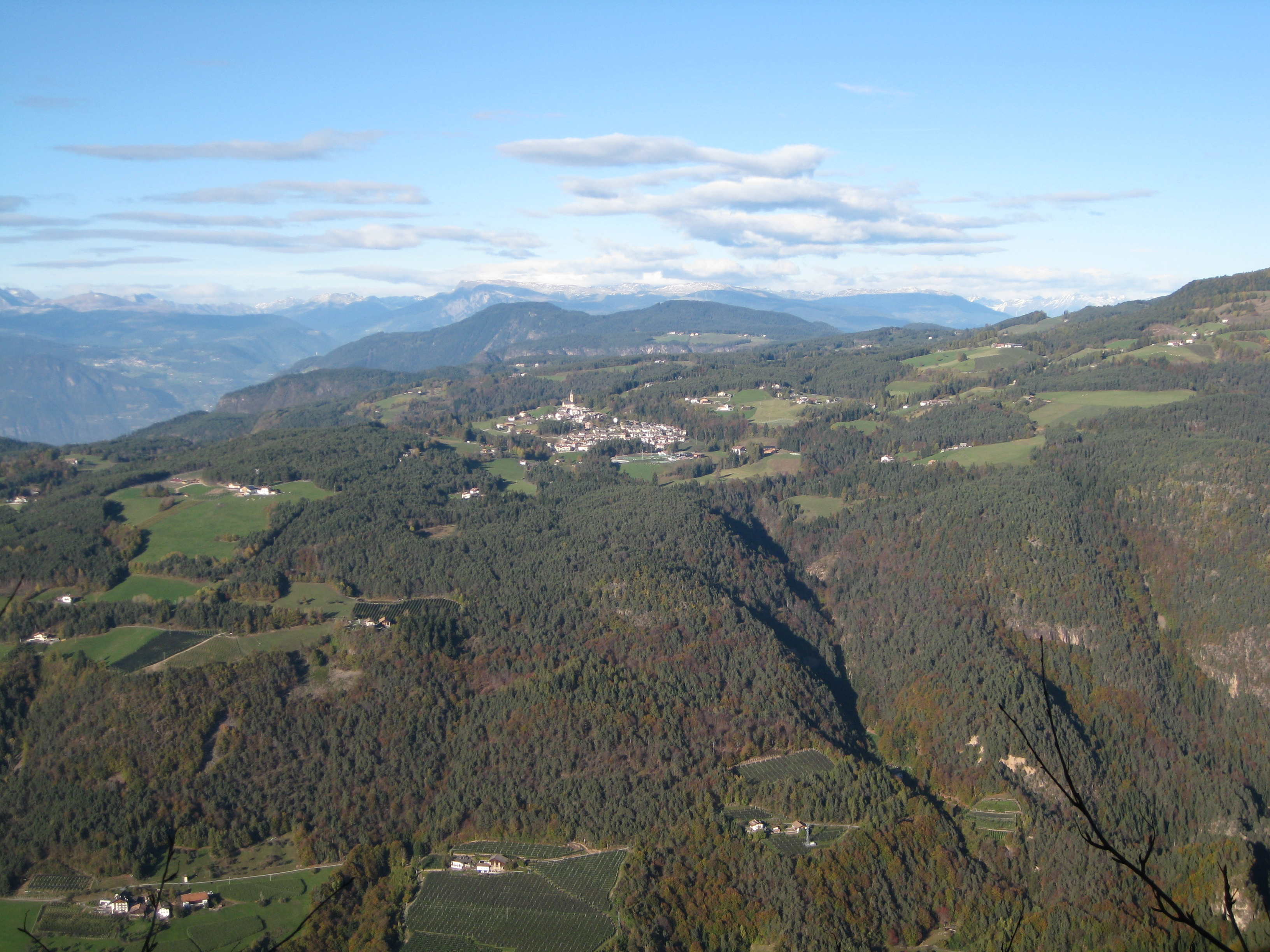 Das Dorf Aldein in Südtirol von Süden fotografiert (Nähe Hochwand am Cisloner Berg)